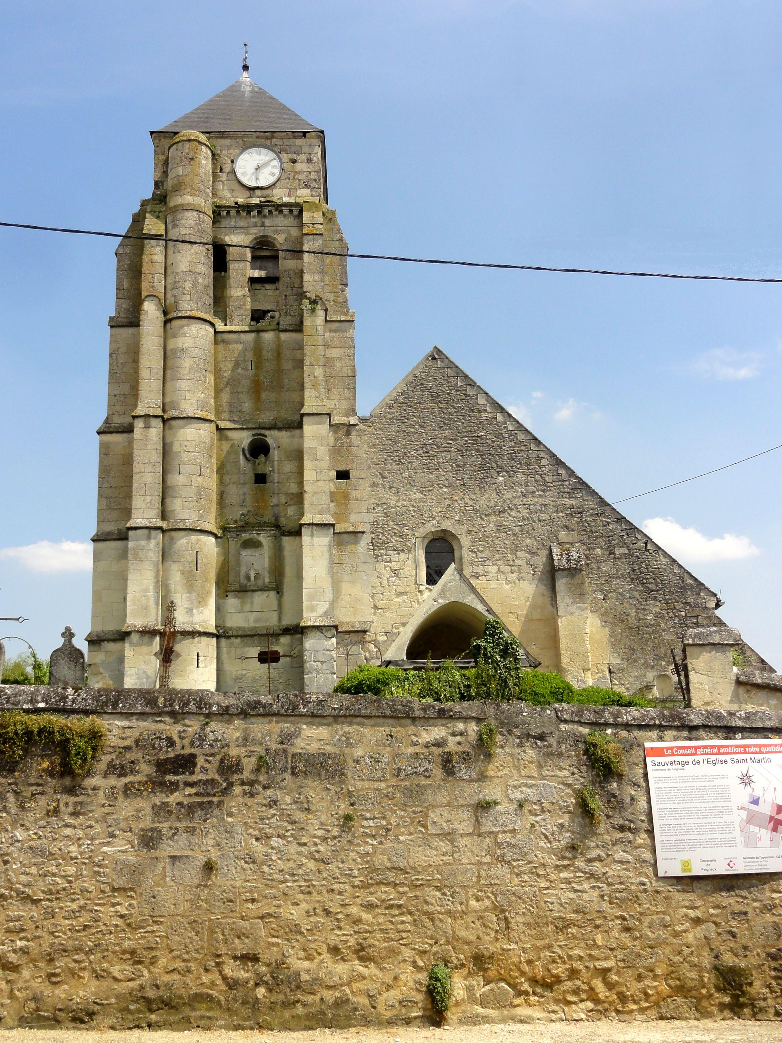 Façade occidentale.